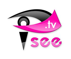 Dit is he logo van I See TV, het is eigendom van I See TV zelf en I See TV heeft ook het auteursrecht. Dit logo is geupload door Sybrand Jissink, medewerker van I See TV. Mijn username op wikipedia is Sop.